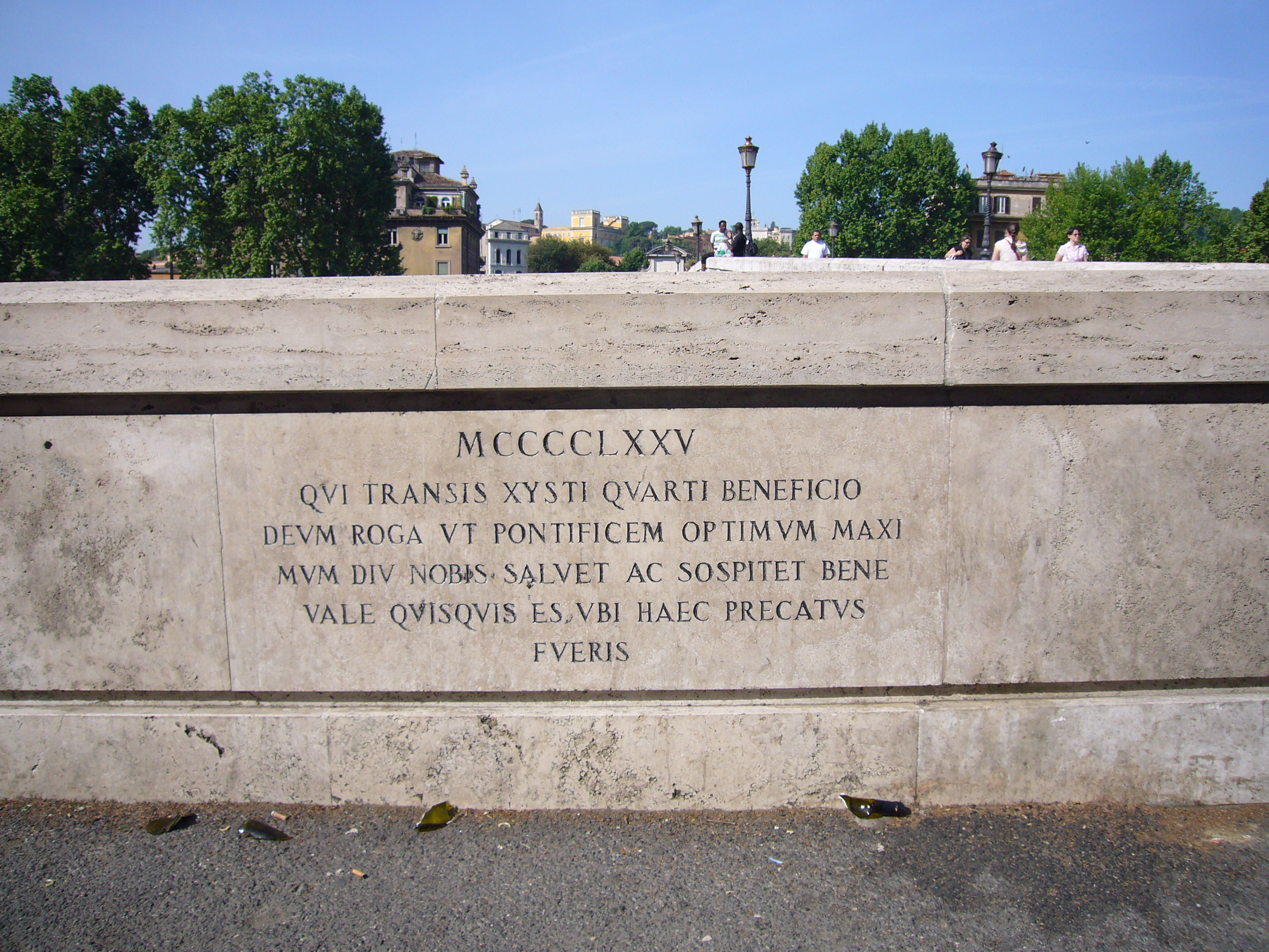 Roma, Ponte Sisto: targa beneaugurante di Sisto IV sulla testata del ponte verso via Giulia ("1475 - Tu che passi grazie a Sisto IV prega che il pontefice ottimo massimo ci sia conservato a lungo e in buona salute - e buona fortuna anche a te che avrai fatto questo augurio, chiunque tu sia")